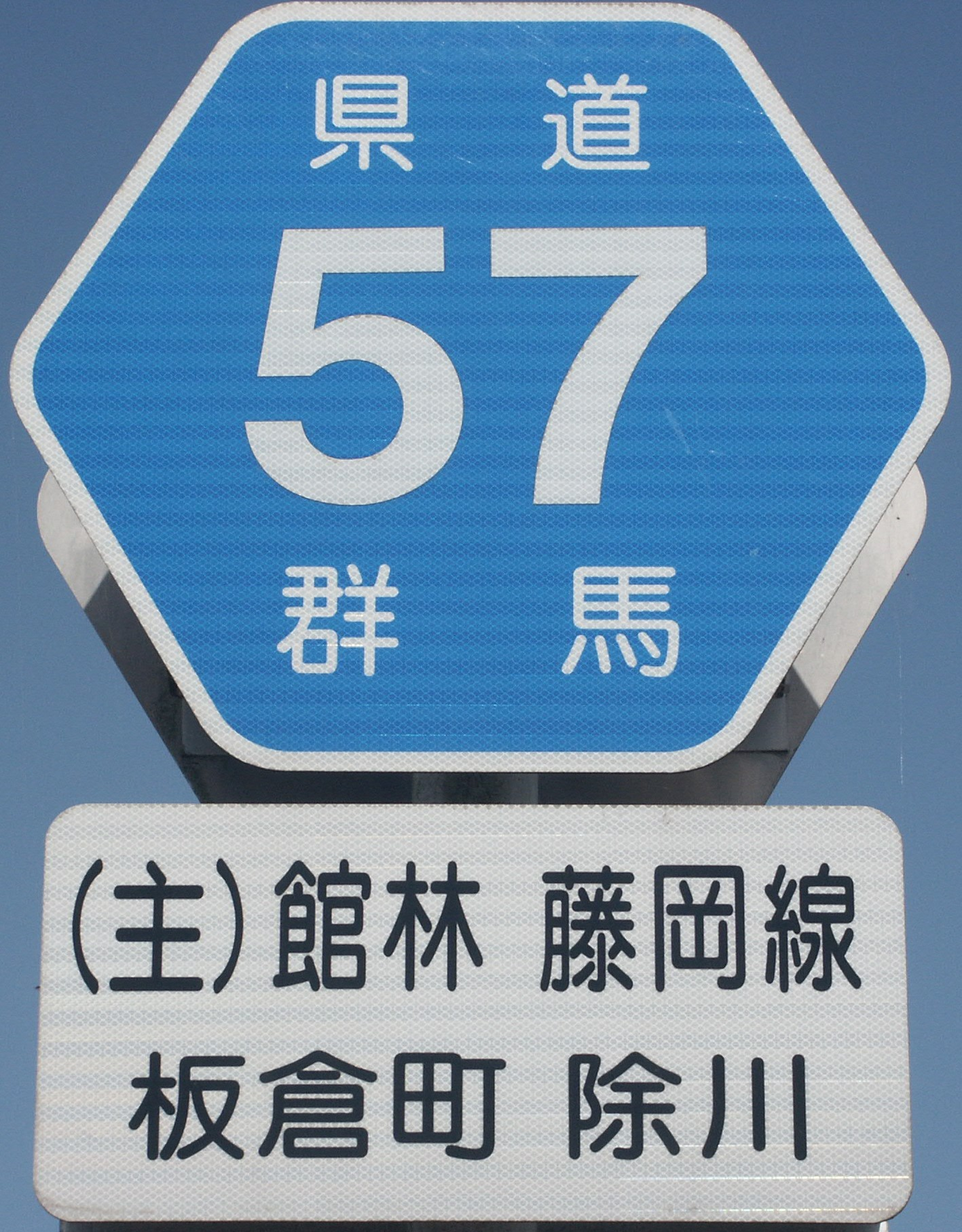 群馬県道57号線の路線番号標識